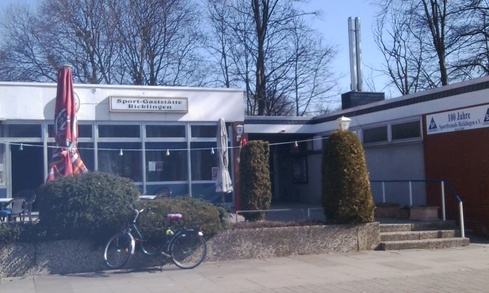 Vereinsheim und -gelände der SF Ricklingen